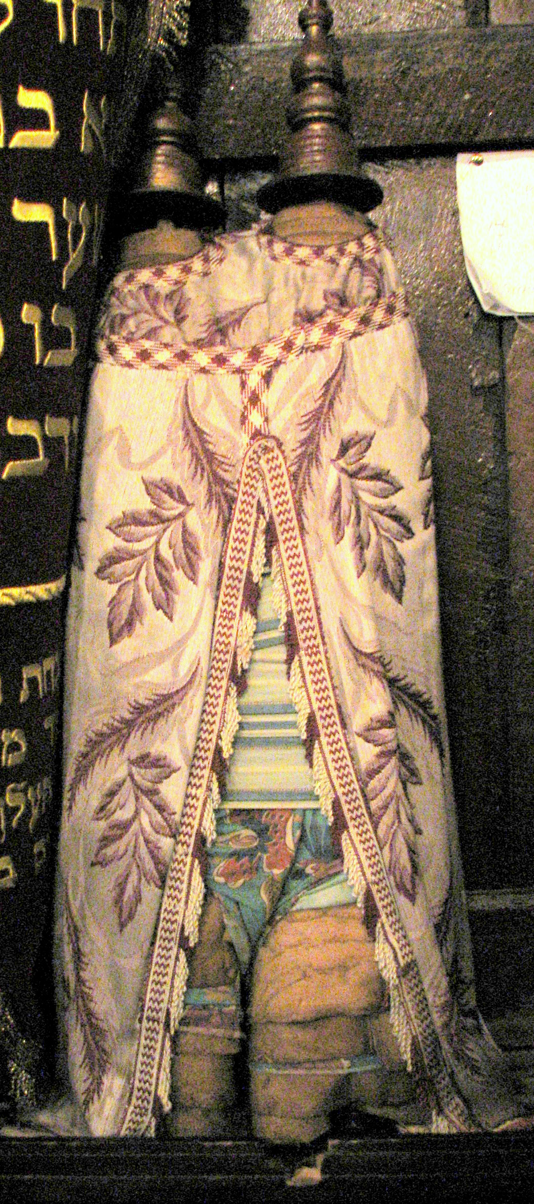 Aben Danan synagogue-Fes Morocco בית הכנסת של משפחת אבן דנאן בעיר פס במרוקו. בית לא פעיל. הפך למוזיאון בשנת 1999. מתוחזק עד היום על ידי המשפחה המוסלמית שטיפלה בו בזמן שהיה פעיל""